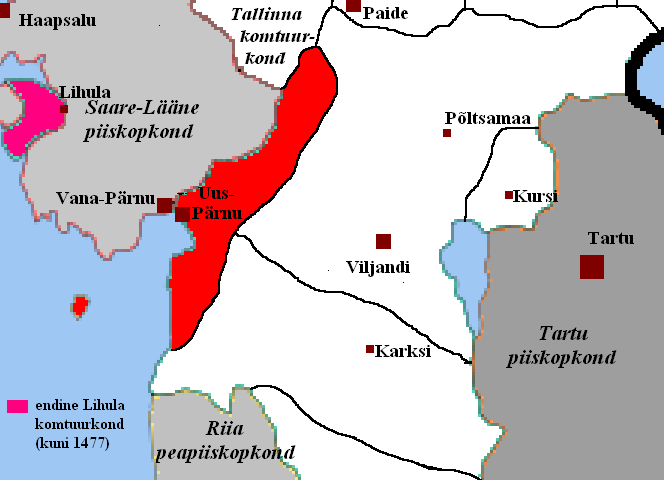 Pärnu komtuurkonna asendikaart